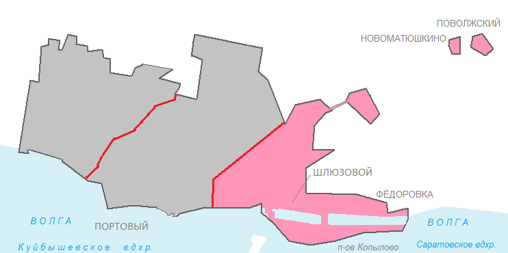 Комсомольский район Тольятти